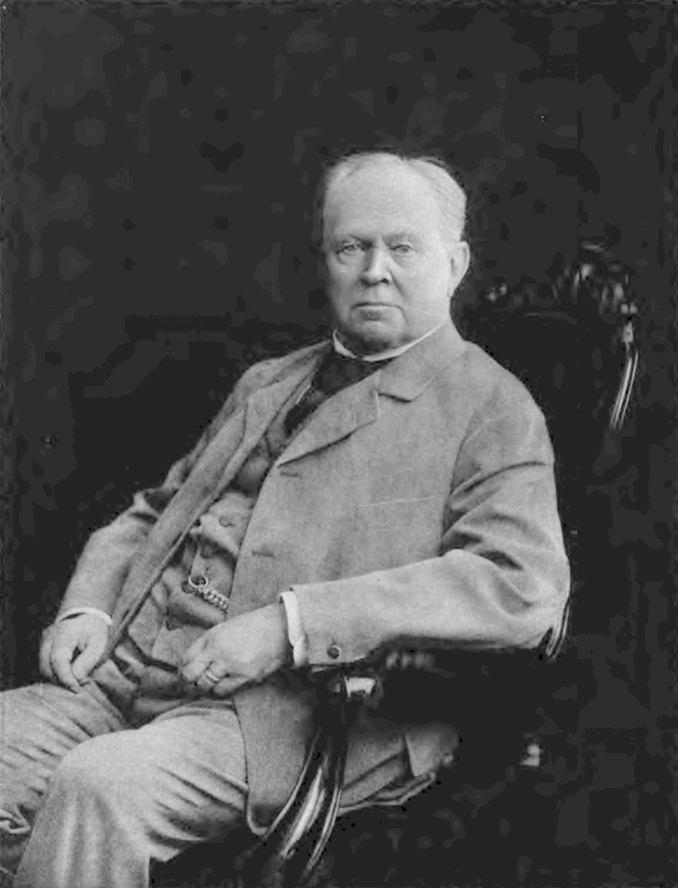 Kuno Fischer (1824-1907) Heliogravüre nach einem Photo von Ed. Schultze Heidelberg (Max Kögel). In: Geschichte der neuern Philosophie. Carl Winter’s Universitätsbuchhandlung, Heidelberg 1901. Achter Band. Hegels Leben, Werke und Lehre. Erster Theil. Mit einem Bildnis des Verfassers in Heliogravüre.